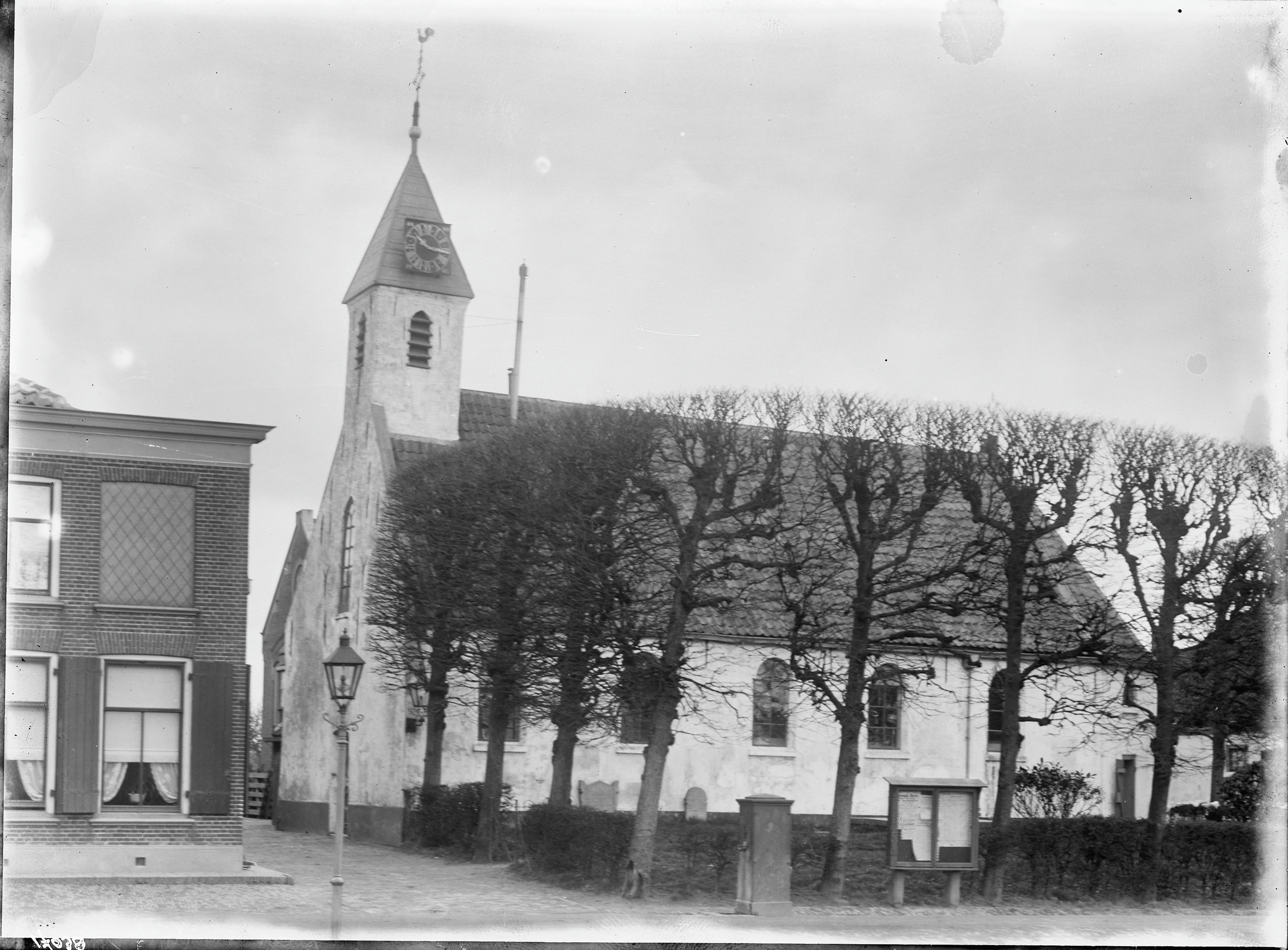 Nederlands Hervormde Kerk: exterieur